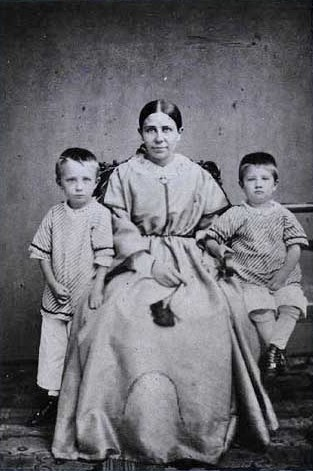 Georgia Maria Luise Skovgaard, née Schouw (1828-1868), Danish embroideress, with her sons Joakim (1856-1933) and Niels Skovgaard (1858-1938)